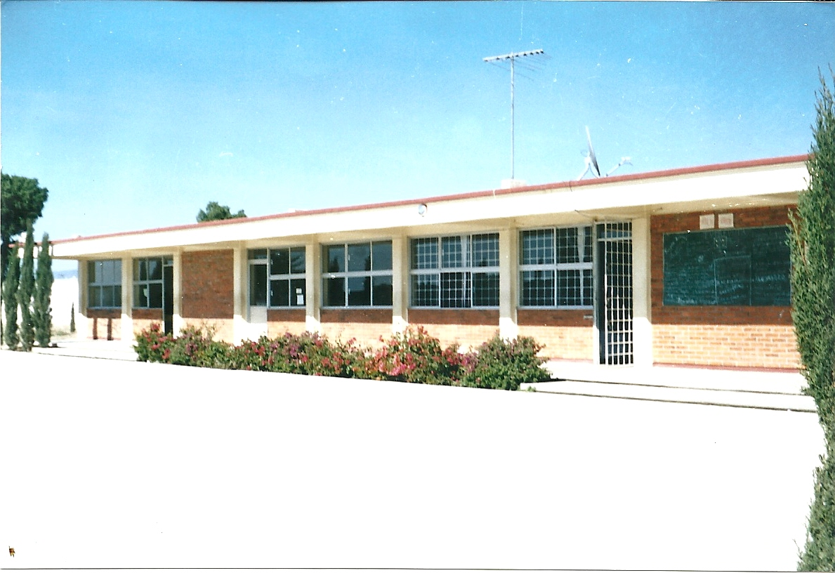 Bachillerato José María Morelos y Pavón, Palmarito Tochapán.